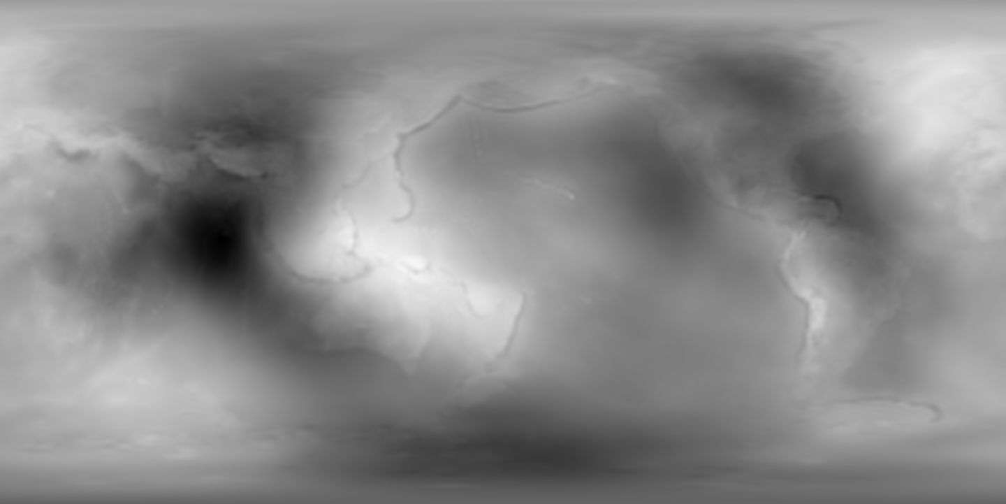 תמונה של קובץ EGM שיש בו נתונים גלובליים לגבי ההפרש בין גובה גיאואידי לגובה אלפסואידי.